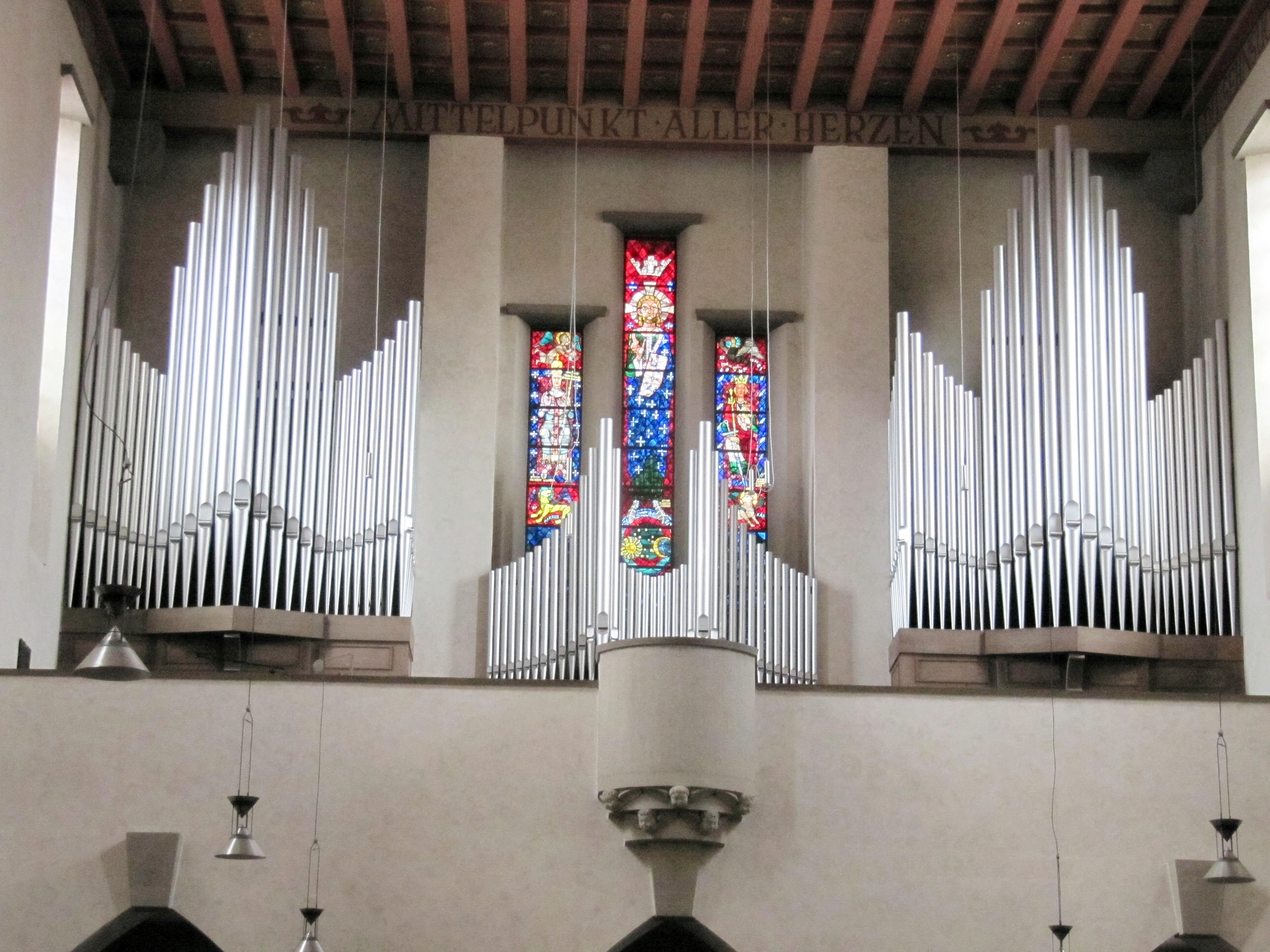 Binder & Siemann-Orgel der Herz-Jesu-Kirche in Regensburg